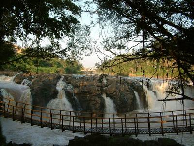 Thác Dray Sap ở Đak Lak, do tôi chụp vào tháng 7/2005